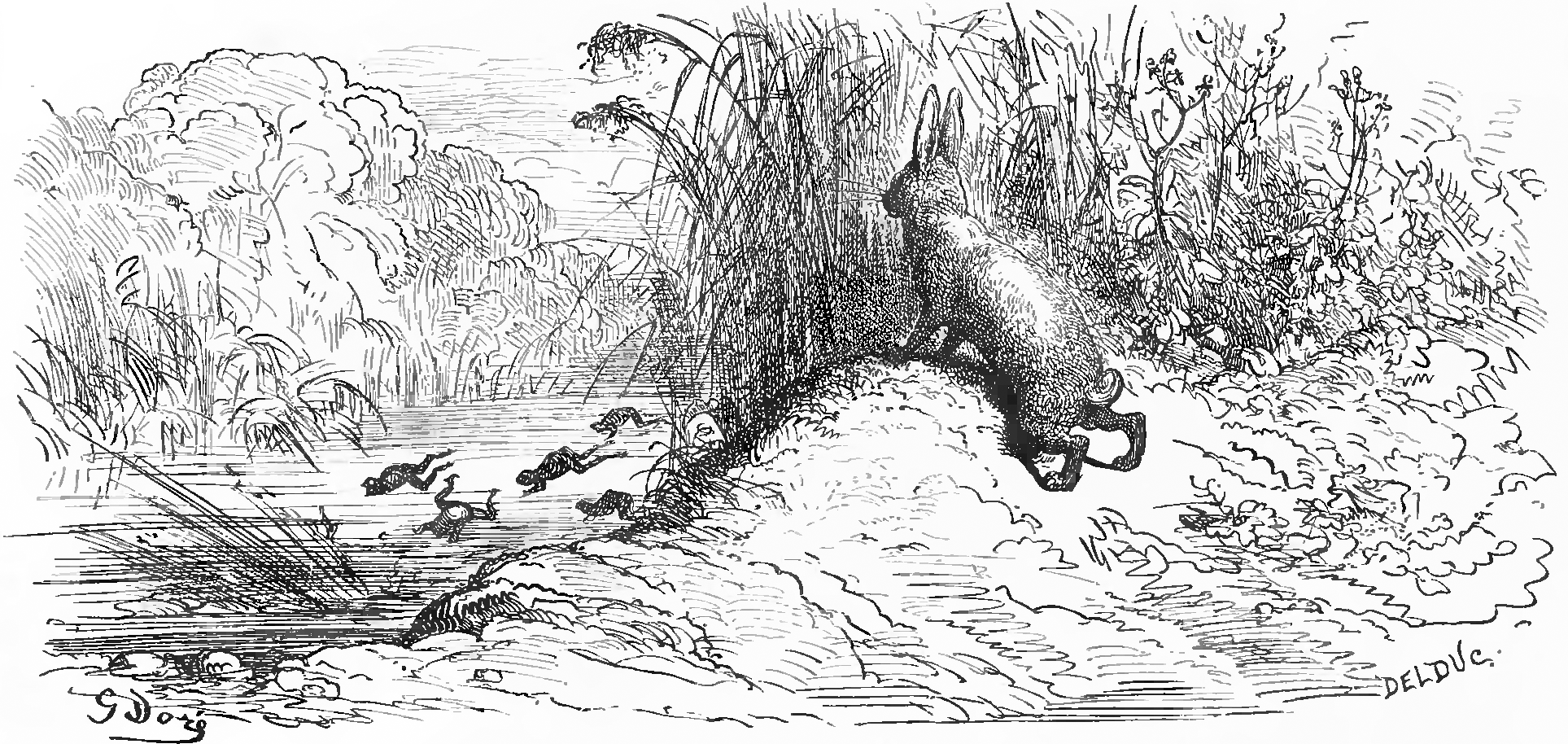 grafika z książki PL Bajki, Jean de La Fontaine, nakładem i drukiem Jana Noskowskiego, Warszawa 1876